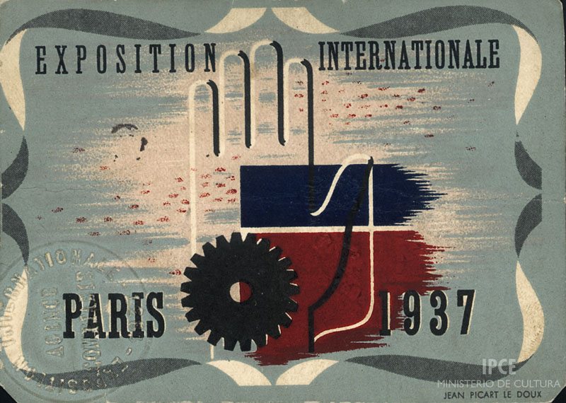 Carnet que acreditaba como personal organizador de uno de los pabellones de la Exposición Internacional de 1937 en París.